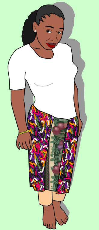 Desenho ilustrando uma capulana, veste feminina característica de Moçambique.